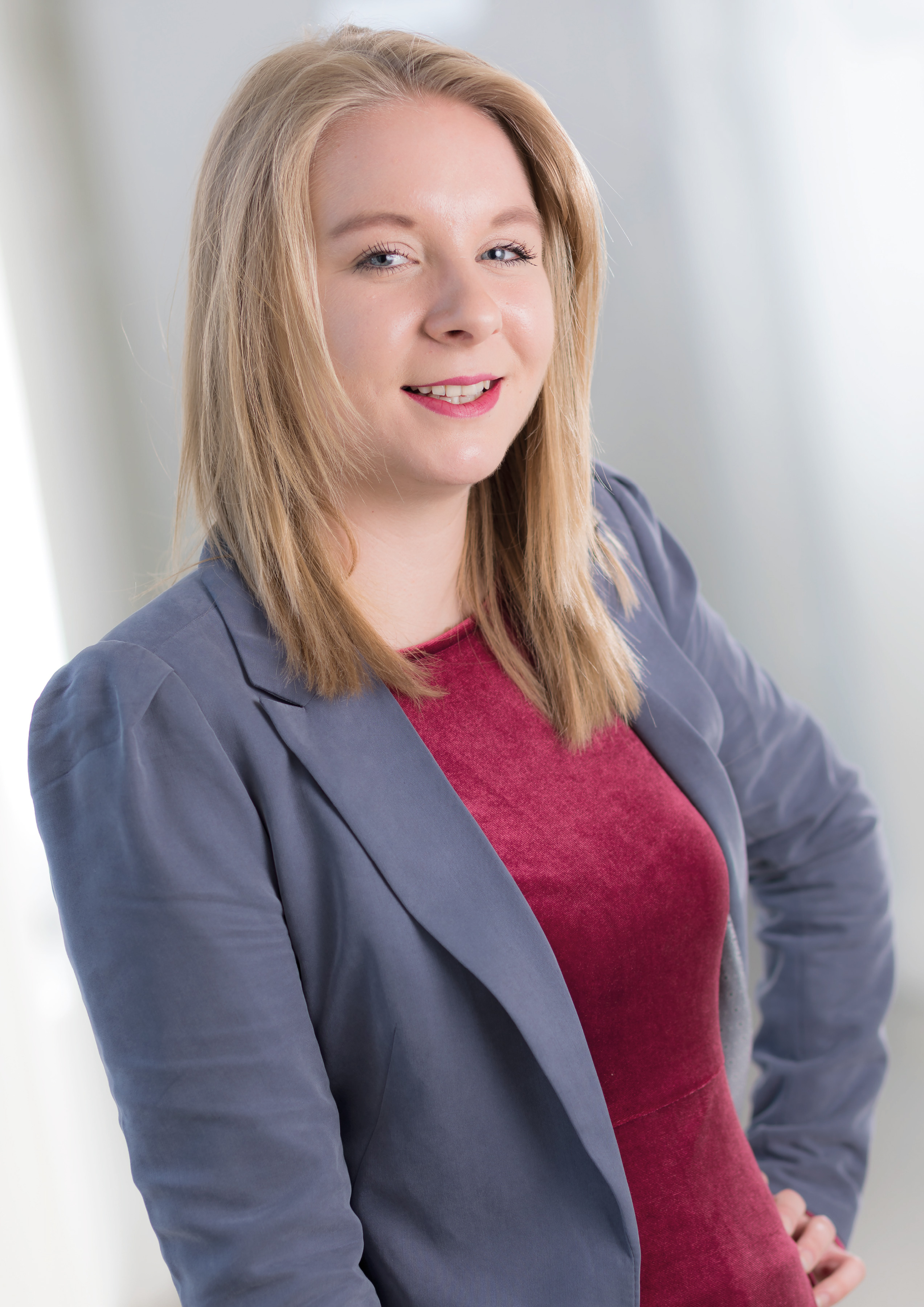 LA Elisabeth Fleischanderl